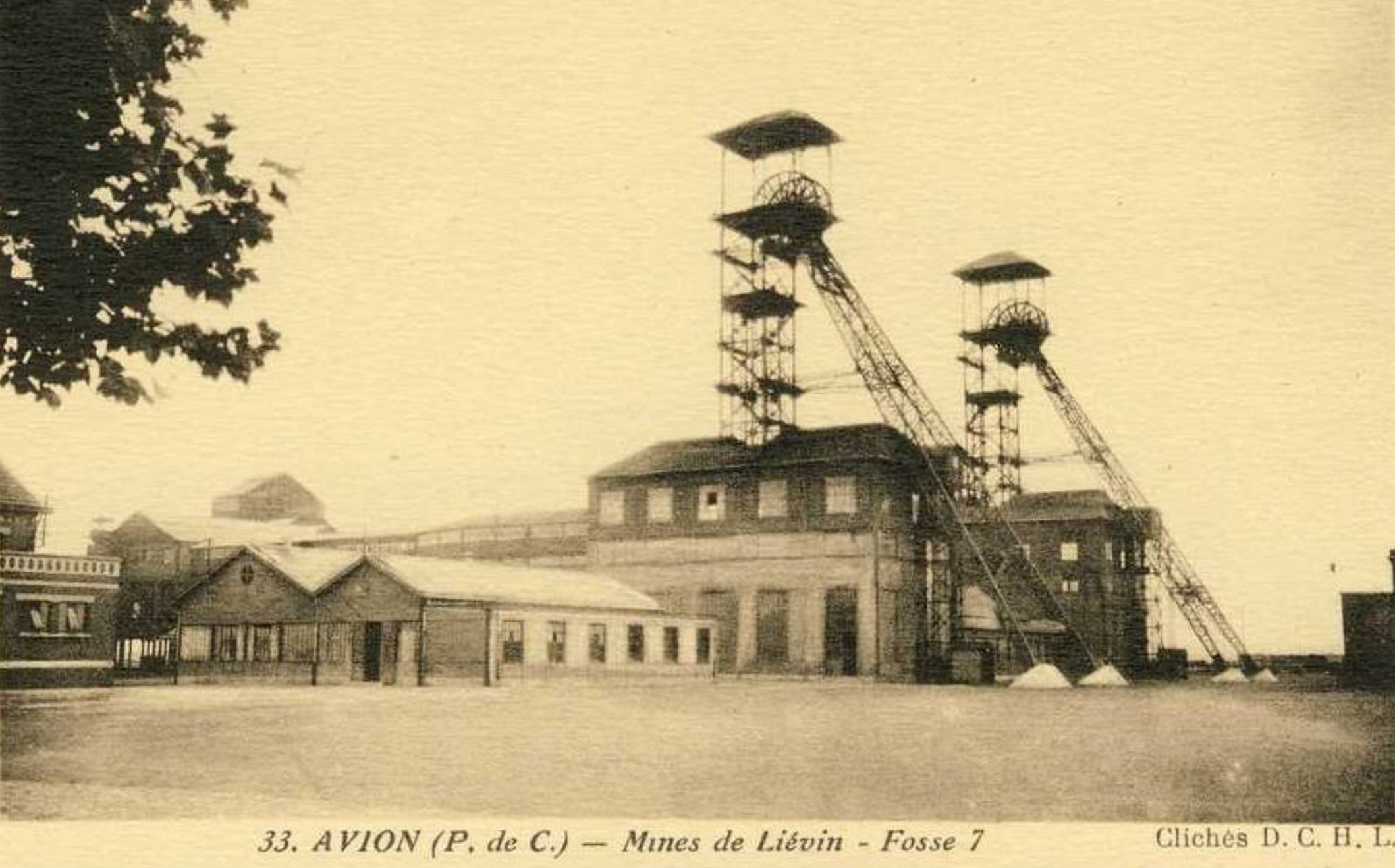 Fosse n° 7 - 7 bis de la Compagnie des mines de Liévin, Avion, Pas-de-Calais, Nord-Pas-de-Calais, France.